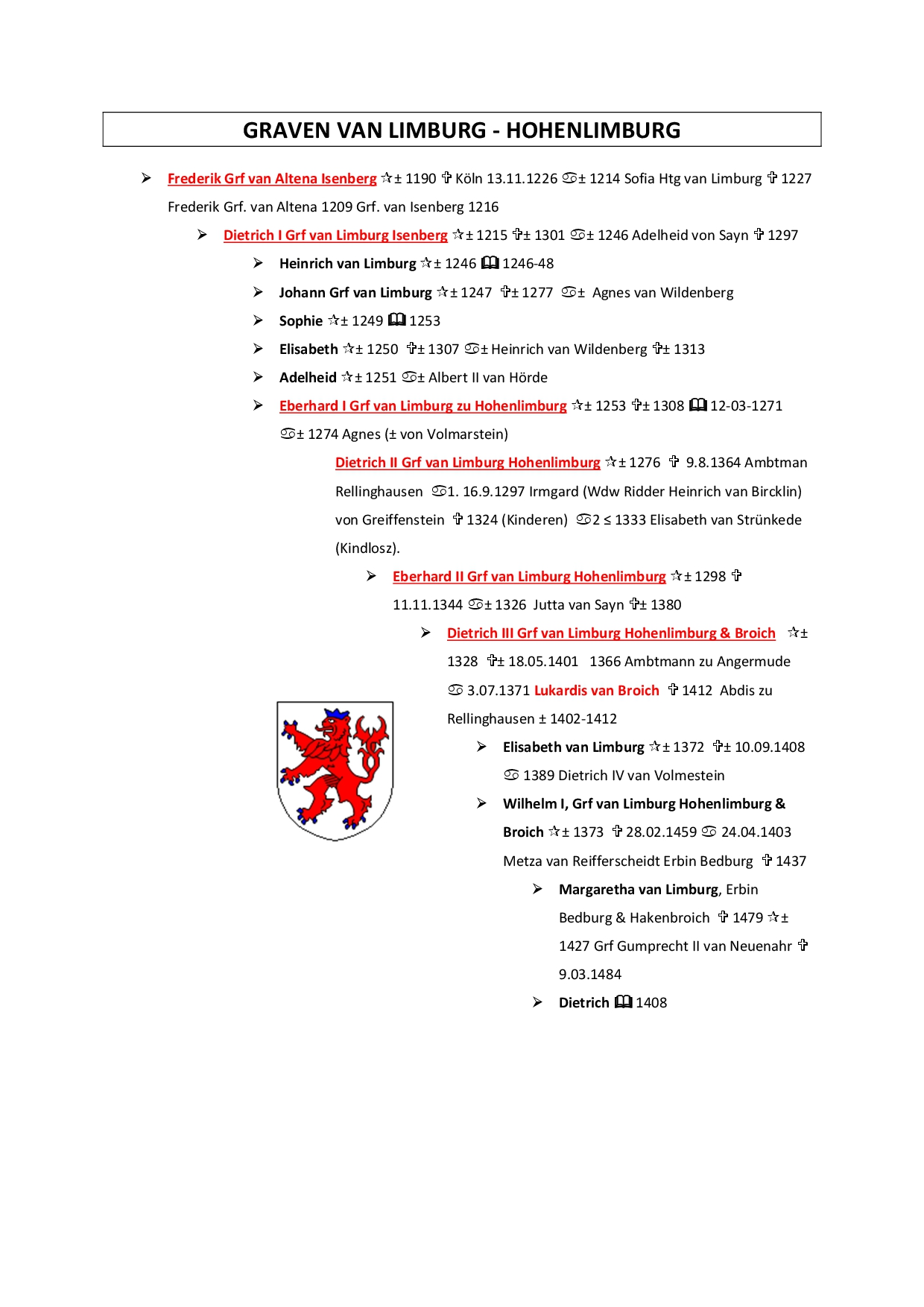 Volledige stamboom van de Graven van Limburg Hohenlimburg & Broich, getoets aan oorspronkelijke bronnen.Uit "Graven van Limburg" ISBN 978-94-92185-59-4